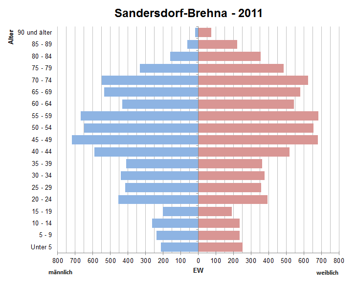 Bevölkerungspyramide der Stadt Sandersdorf-Brehna nach Zensus 2011.